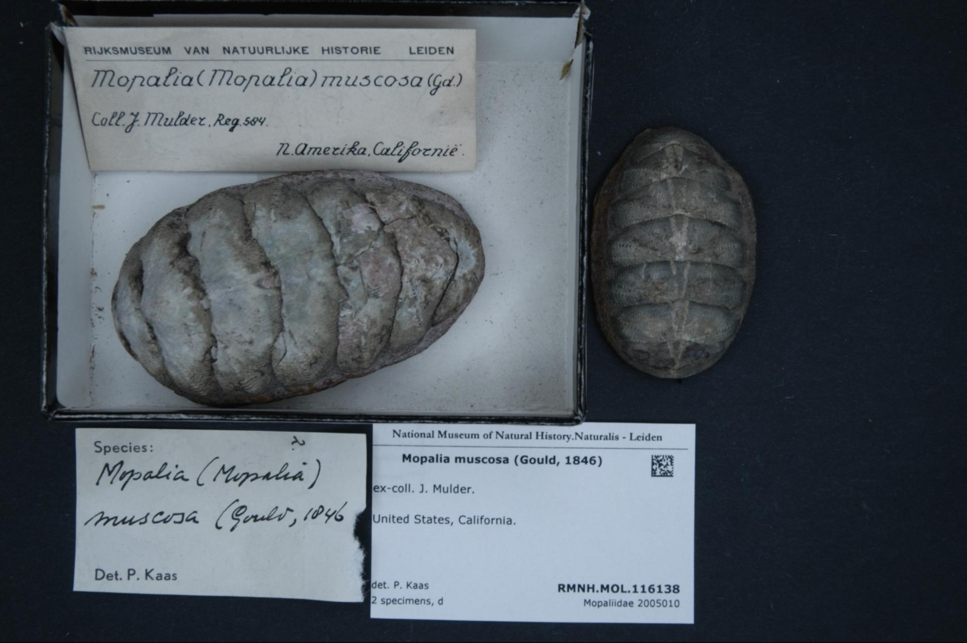 Mopalia muscosa (Gould, 1846)